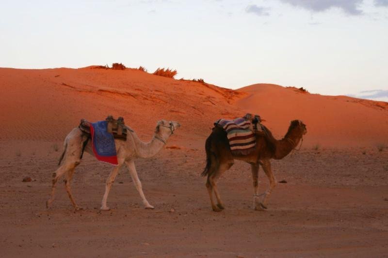 photographie personnelle prise en décembre 2004 montrant des dromadaires en relâche après une journée de travail consistant à convoyer des touristes sahariens, aux environs de l'oasis de Ksar Ghilane en Tunisie.